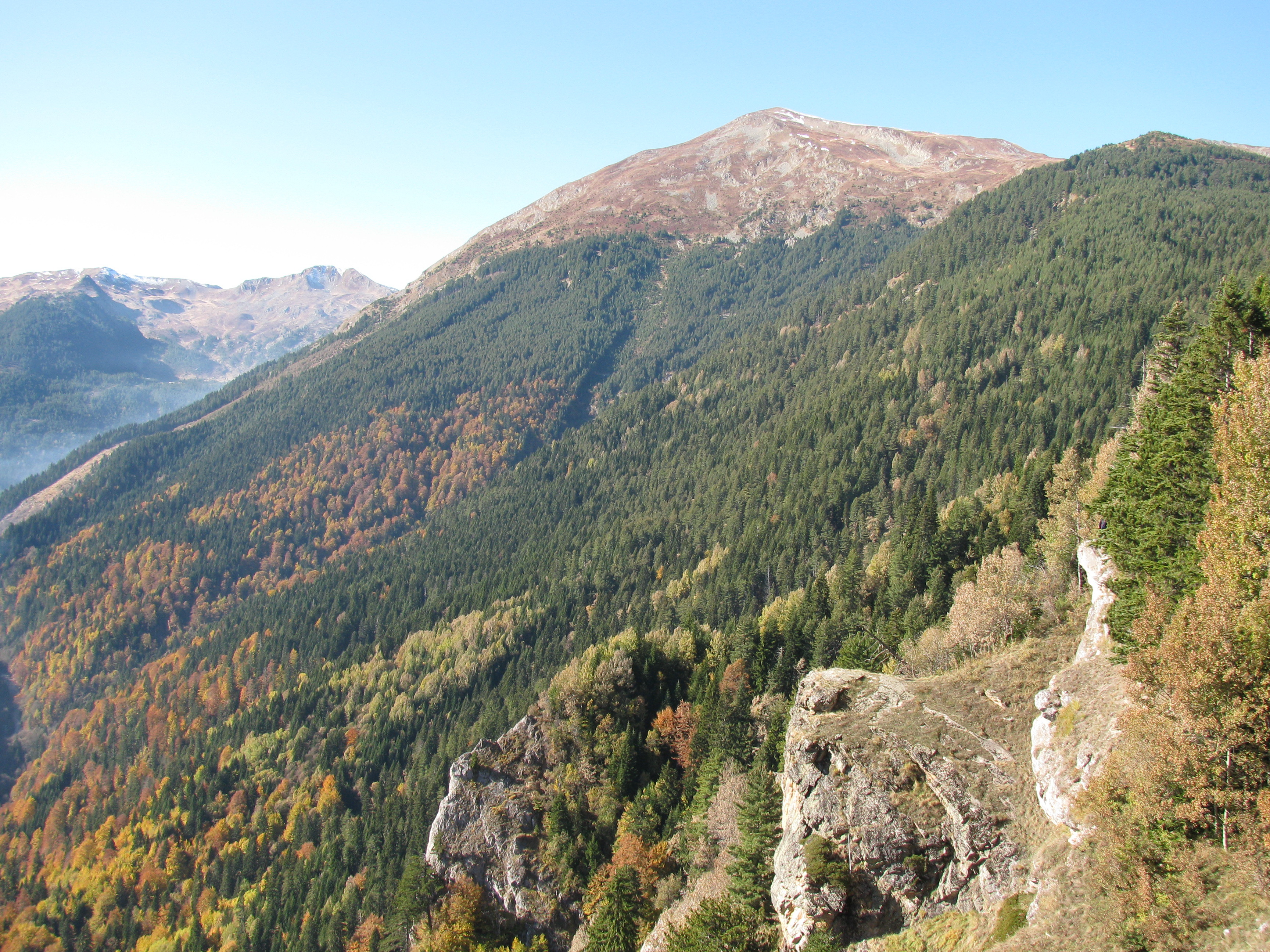 Maja e Ropsit, Deçan